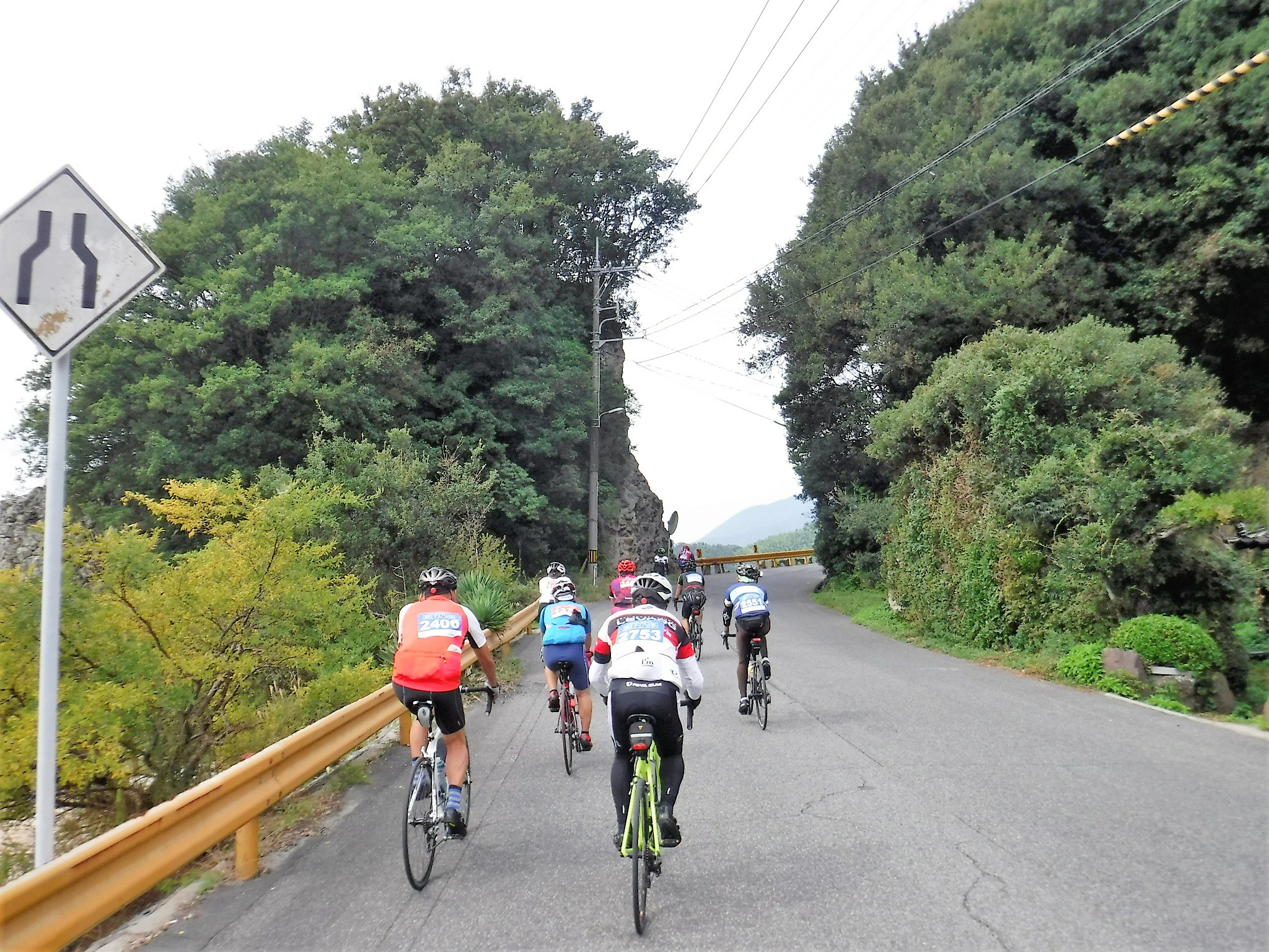 2017年、山口県柳井市で開催された、サザンセトロングライド。周防大島西側。